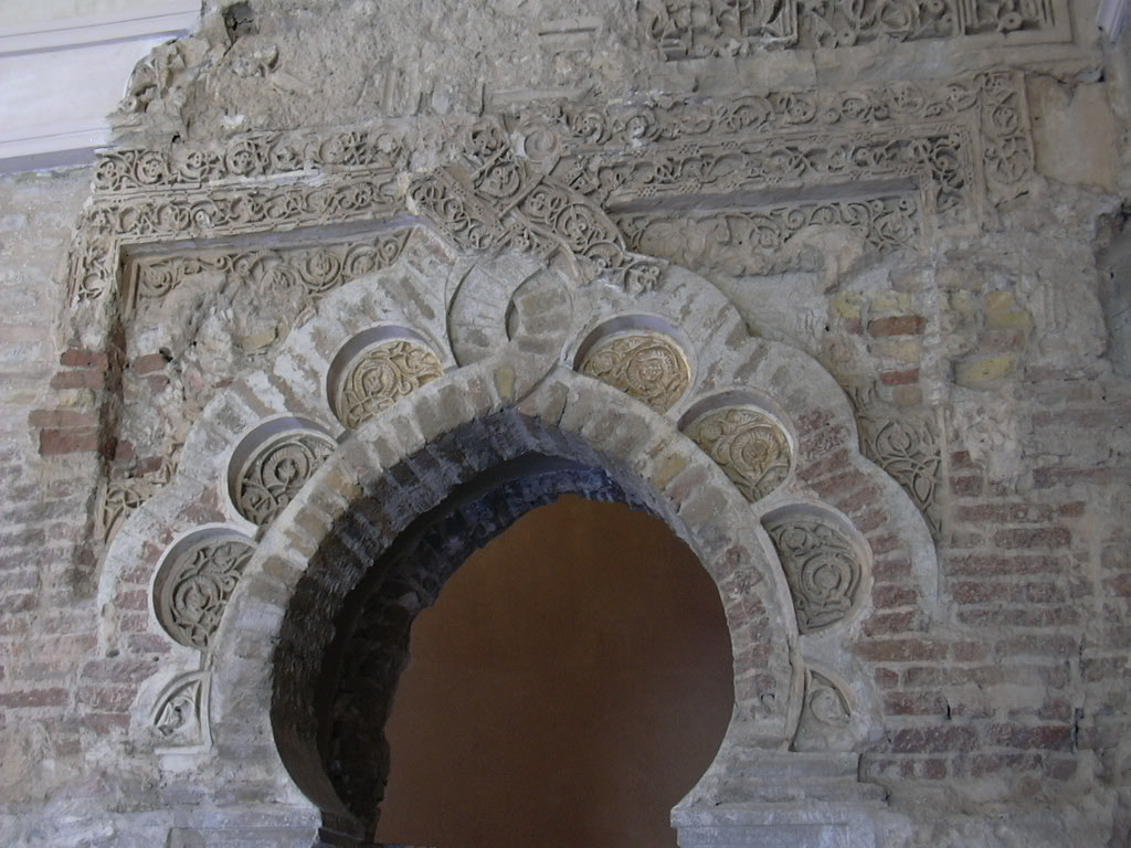 La Aljafería - Palacio taifa - Detalle